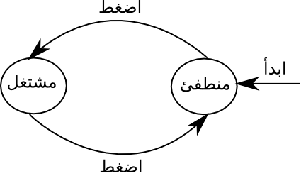 Arabic Automaton